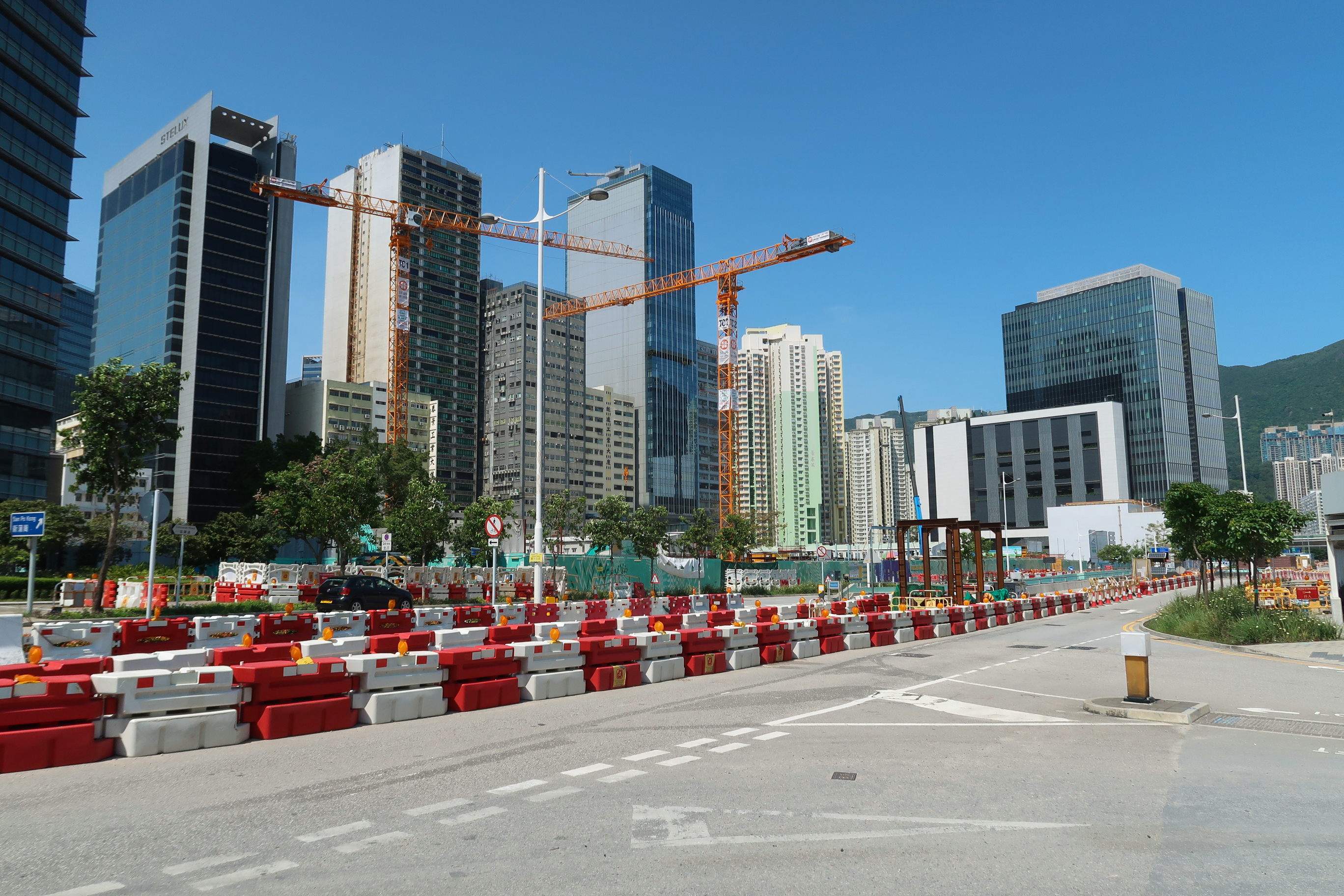 Revenue Tower in Kai Tak Site